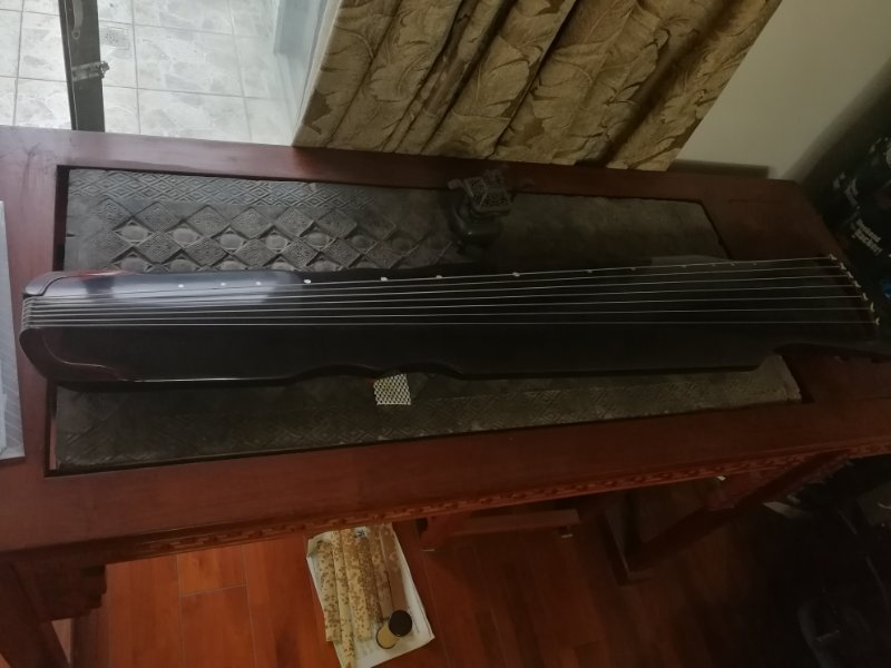 古琴的照片